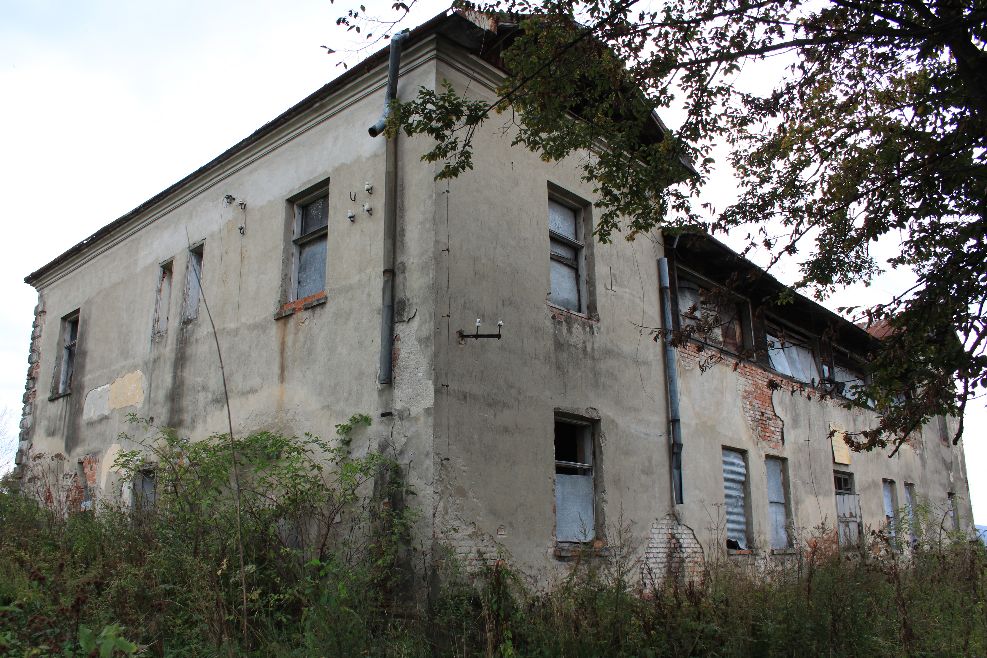 Uherce Mineralne, dwór, A-331